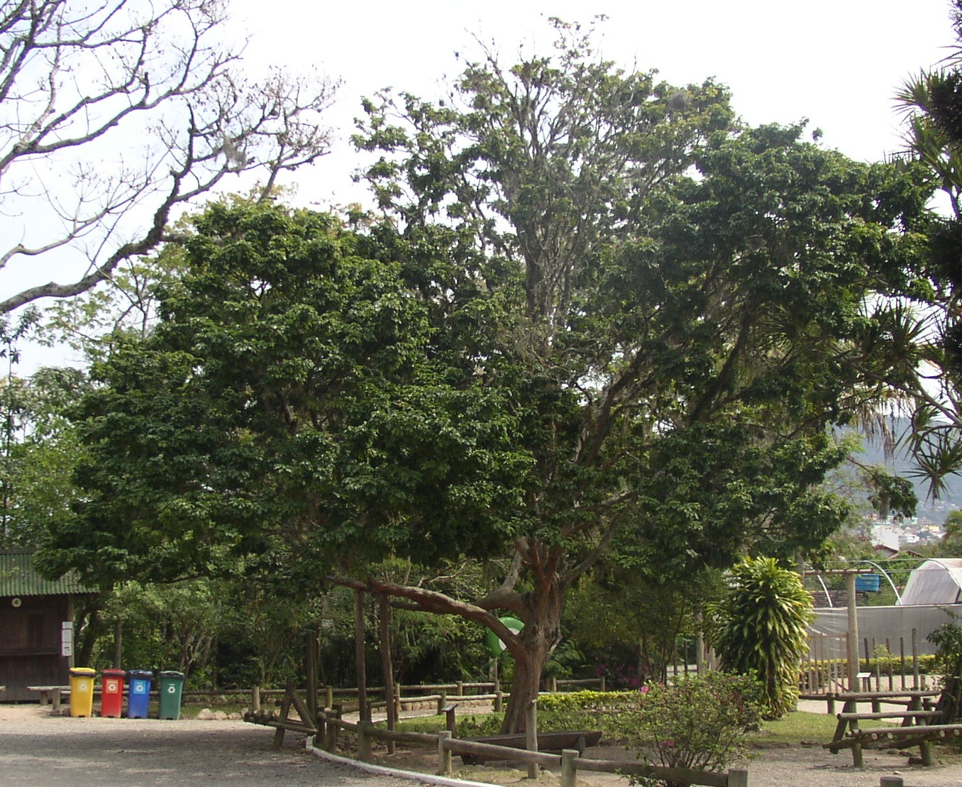 Brasilholz, Aufnahme im Park Córrego Grande in Florianópolis, SC, Brasilien